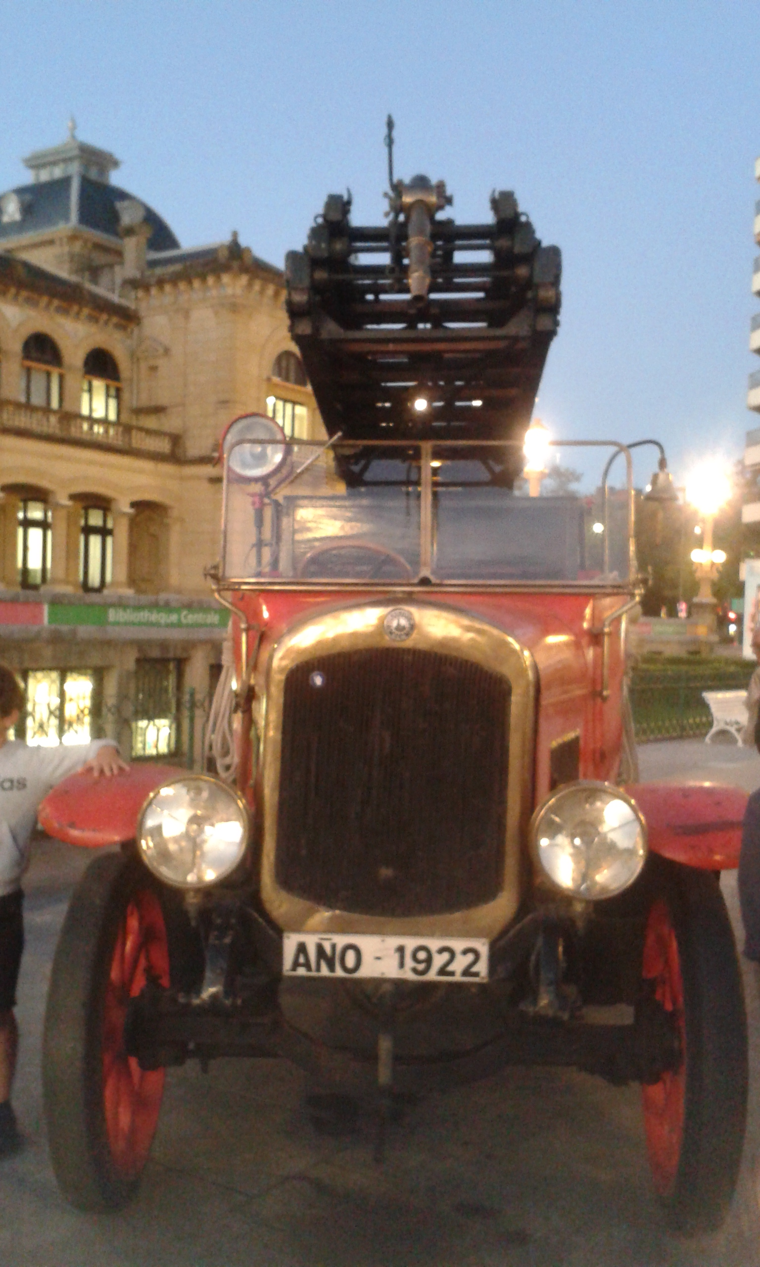 Suhiltzaileen automobil zaharrak